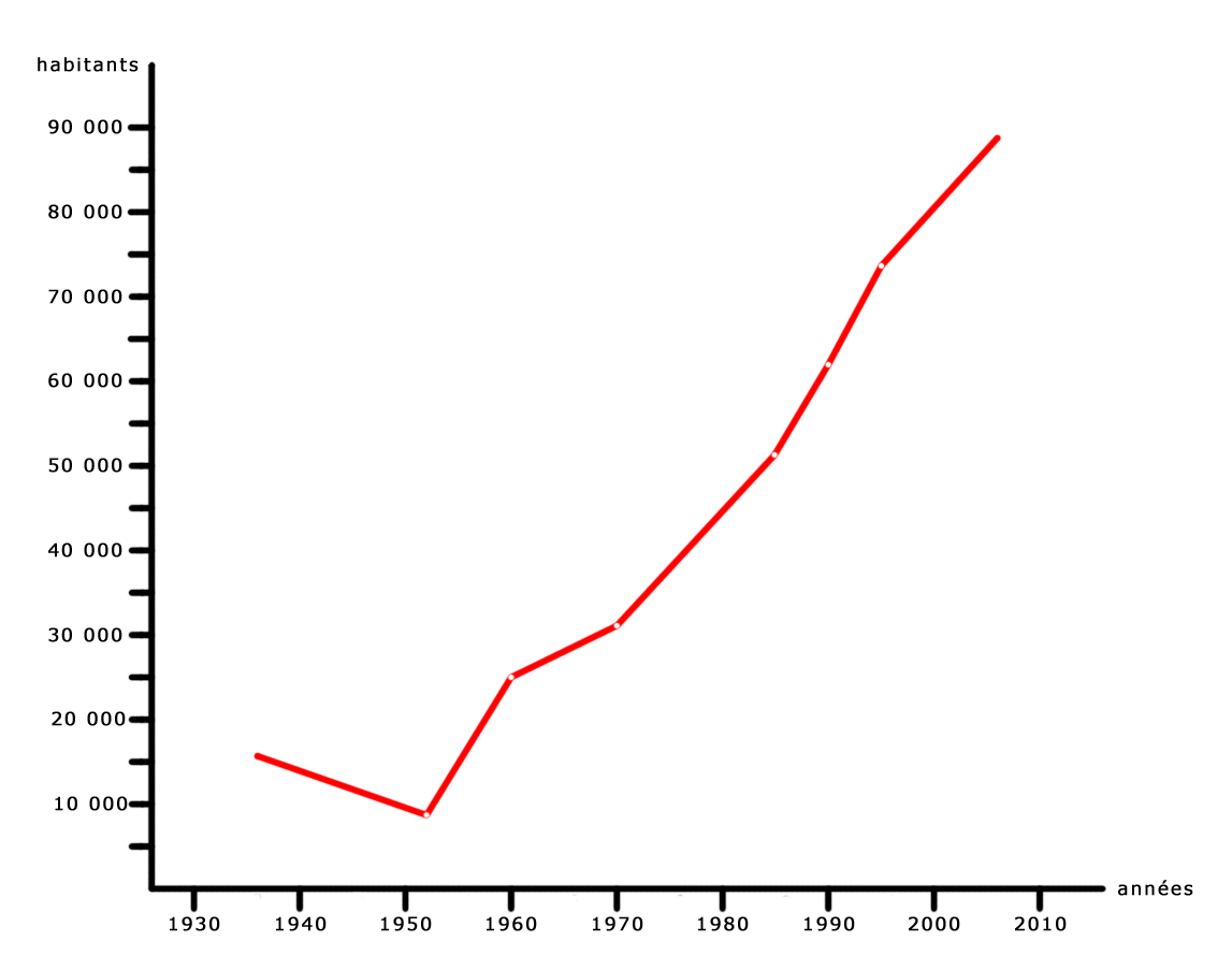 graphque représentant l'évolution de la population de koudougou d'après les chiffres de l'INDS de Ouagadougou.